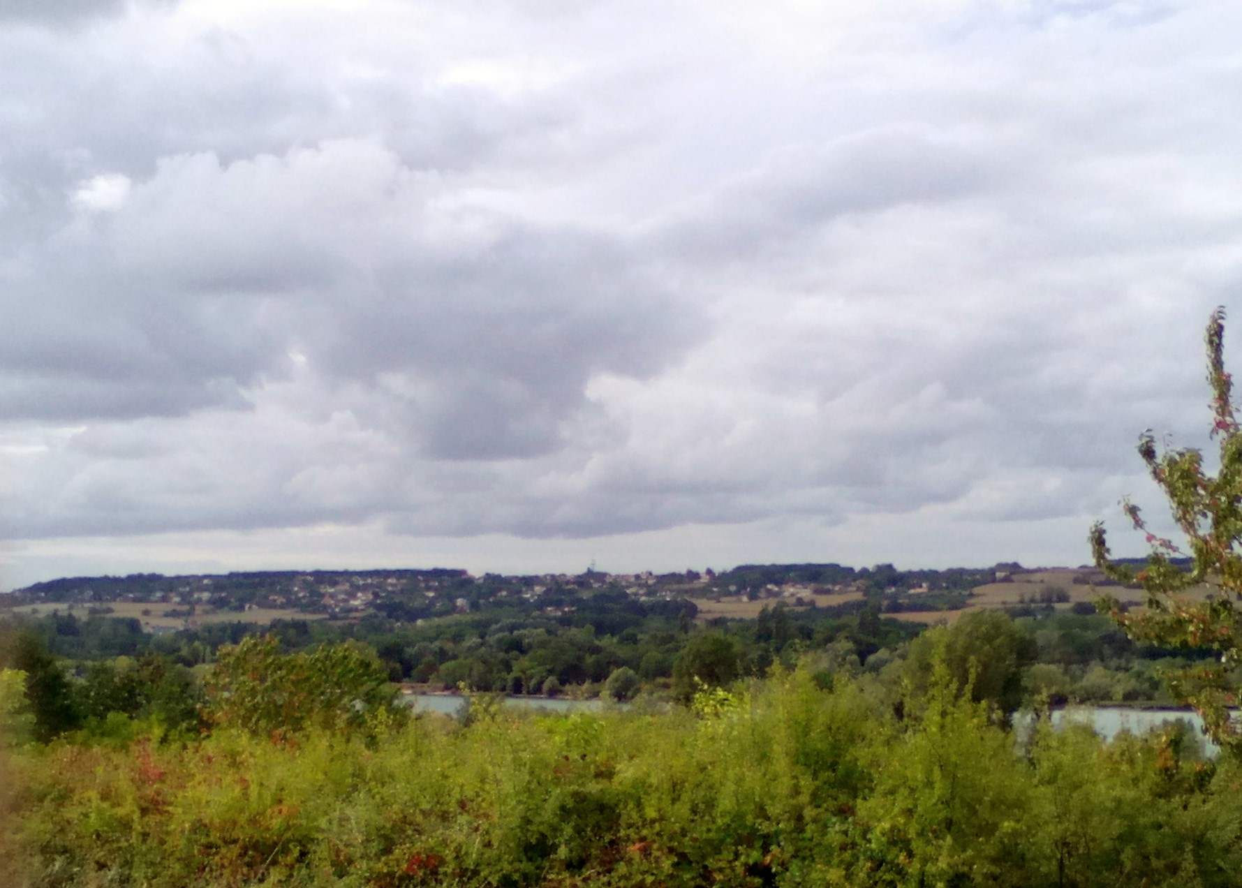 Le lac de Saint-Cyr sur la commune de Beaumont-Saint-Cyr